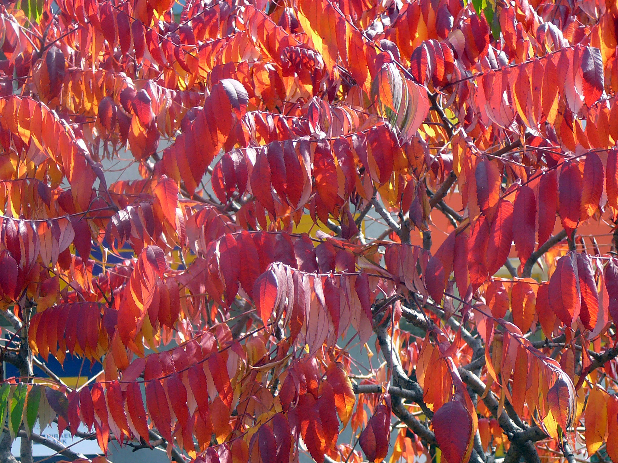 Rhus typhina en automne